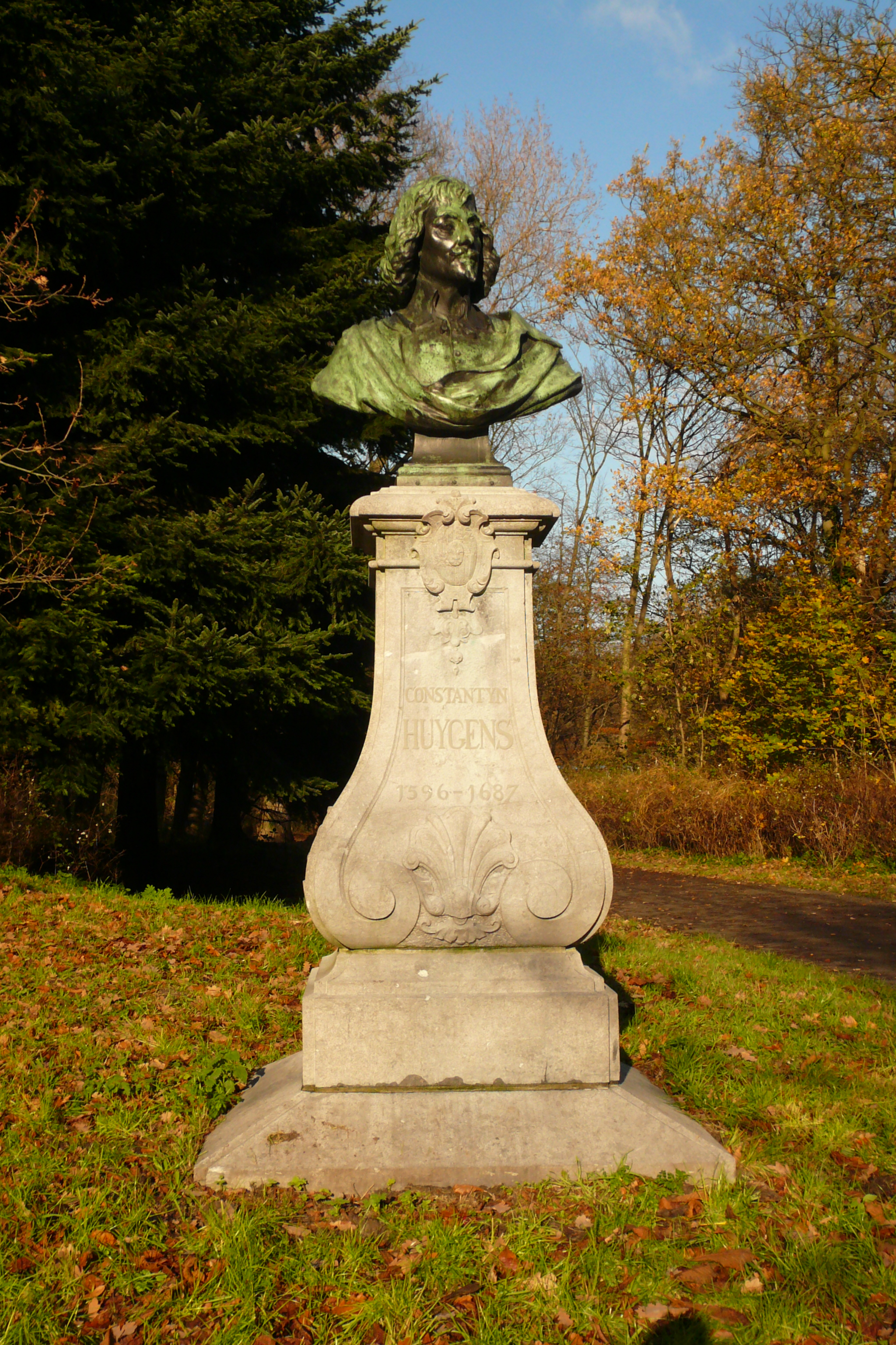 Beeld van Huygens bij ingang van Scheveningse Bos